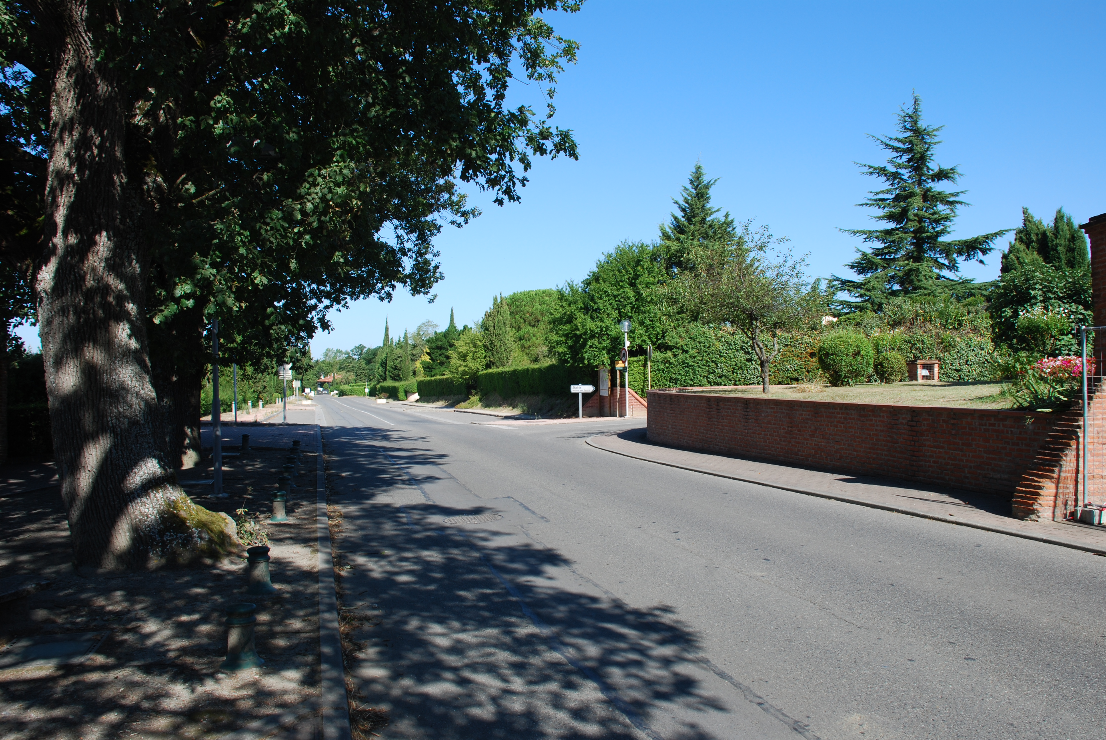 Avenue du Souleilha (D35b) à Vigoulet-Auzil, photo prise juste après l'église. L'accès à la mairie à droite est mentionné sur le panneau.